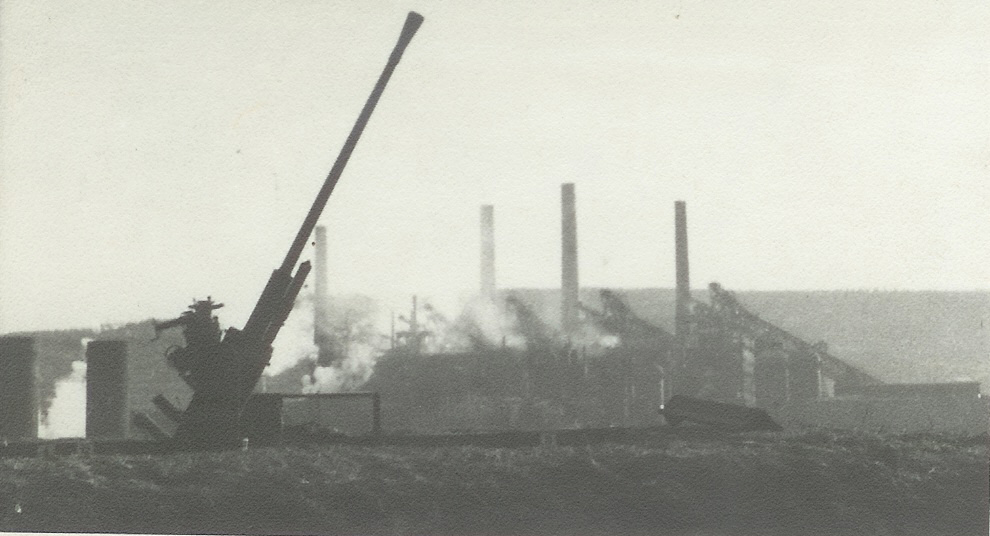 3,7cm-Flak zu Esch-Uelzecht